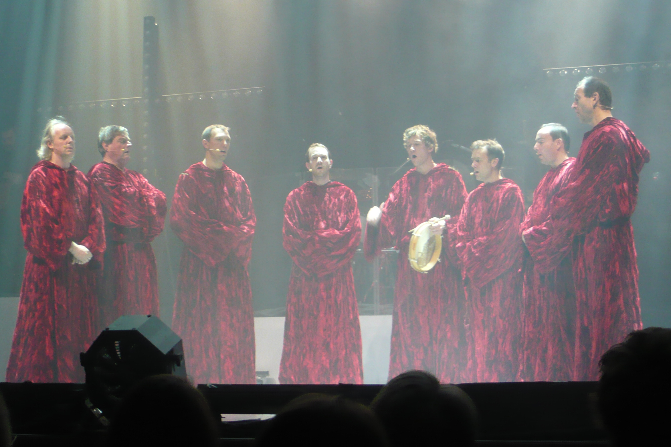 Gregorian und Amelia Brightman live im Konzerthaus Freiburg